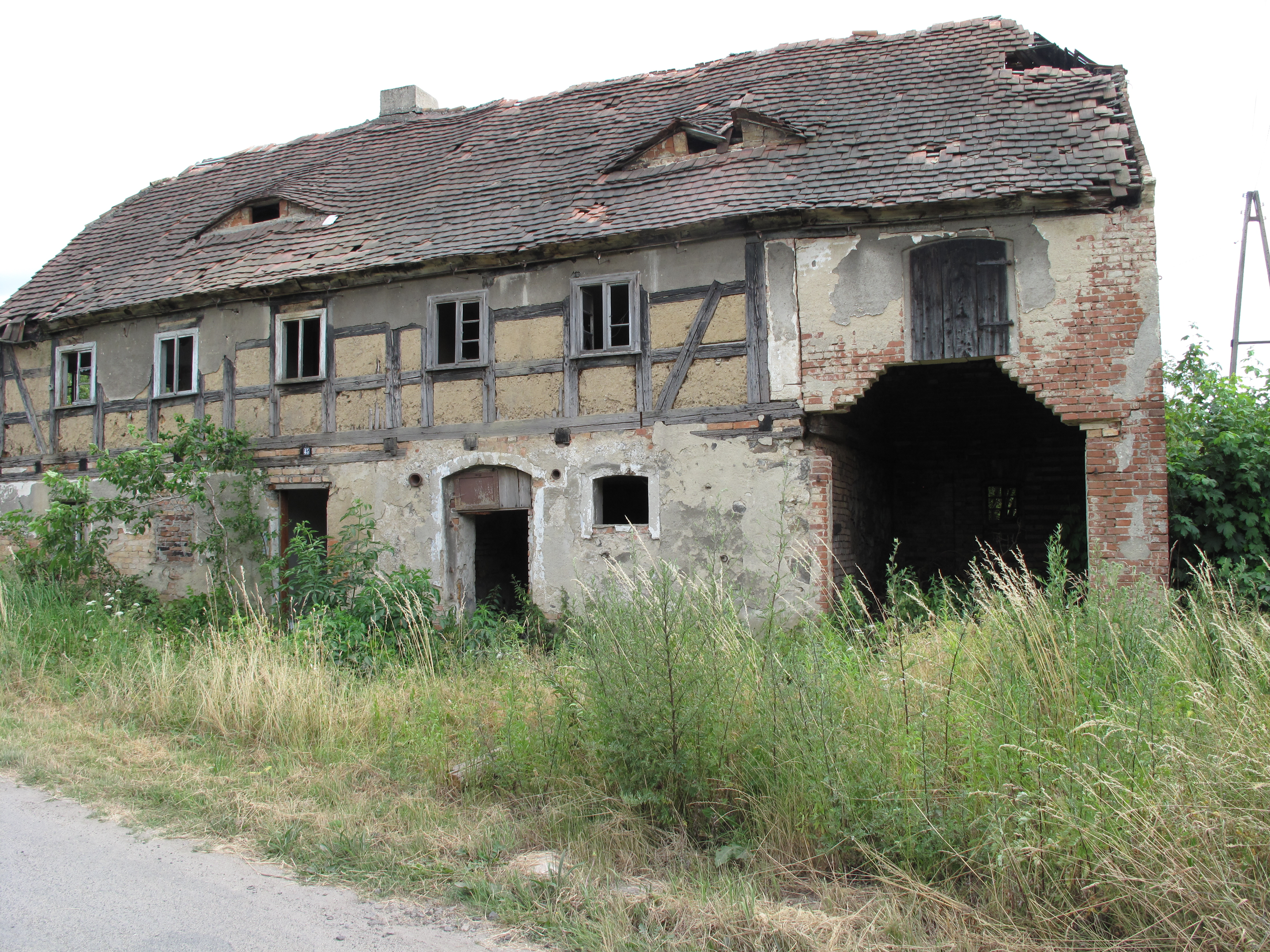 Wrociszów Dolny. Polska.